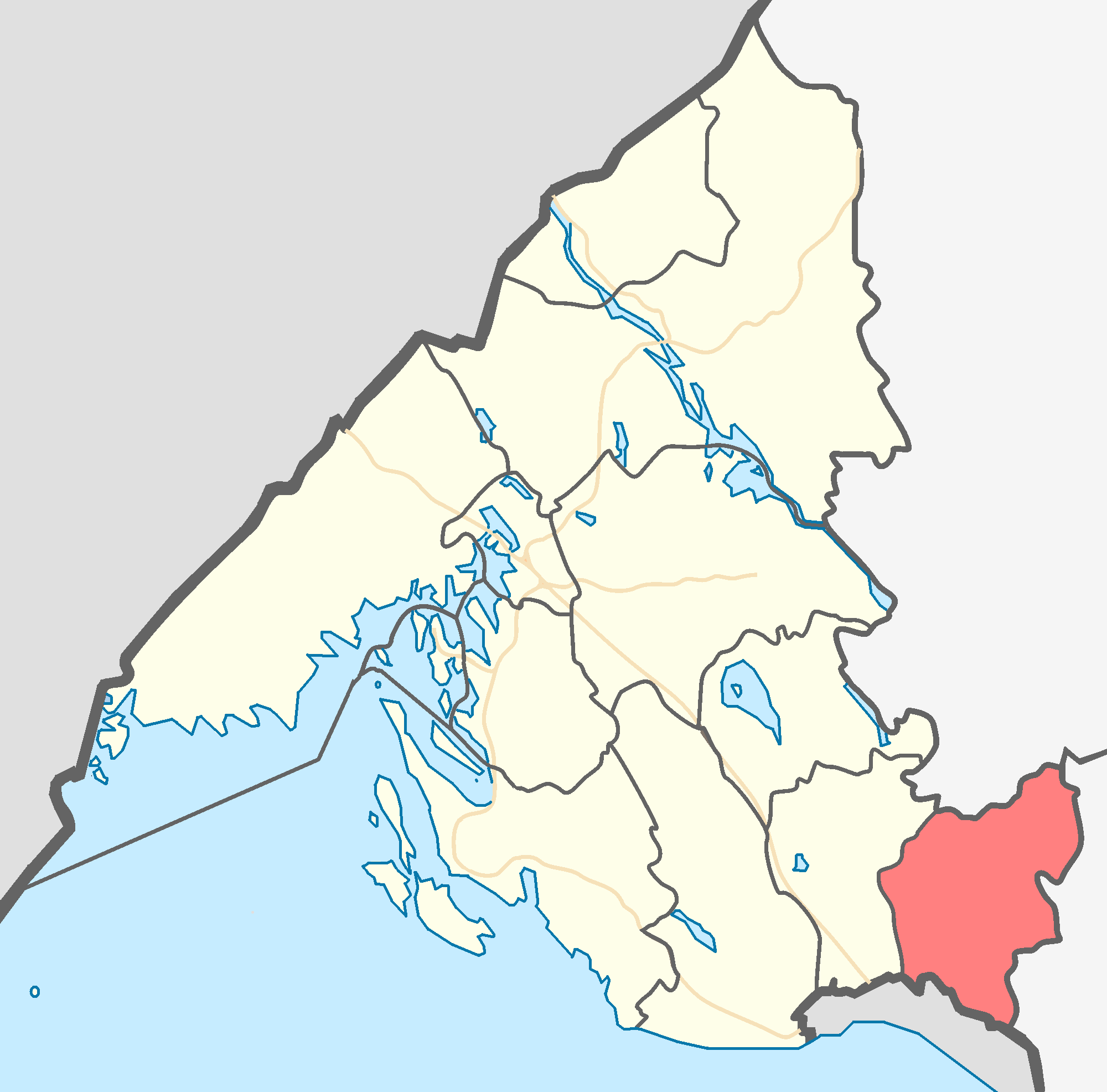 МО Первомайское сельское поселение на карте Выборгского района Ленинградской области